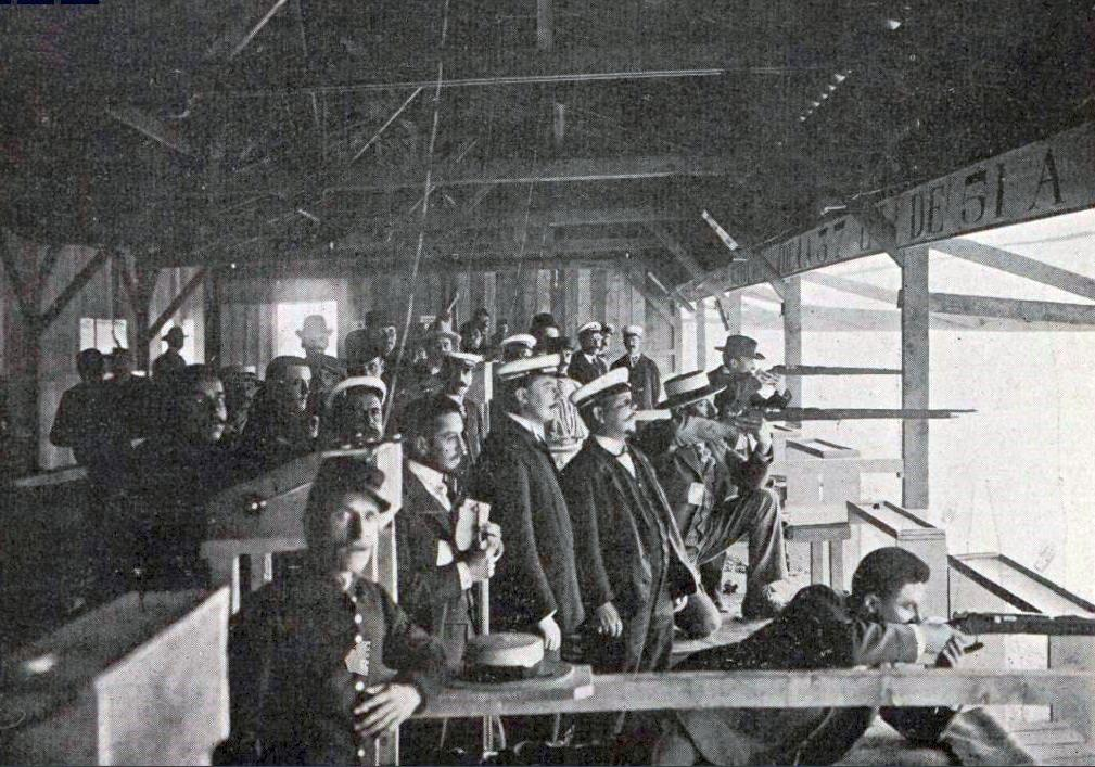 Stand de tir à Satory durant le concours des JO 1900.